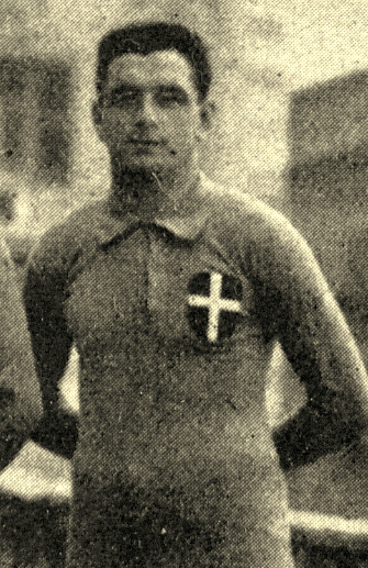 Con la selección nacional, 1921.